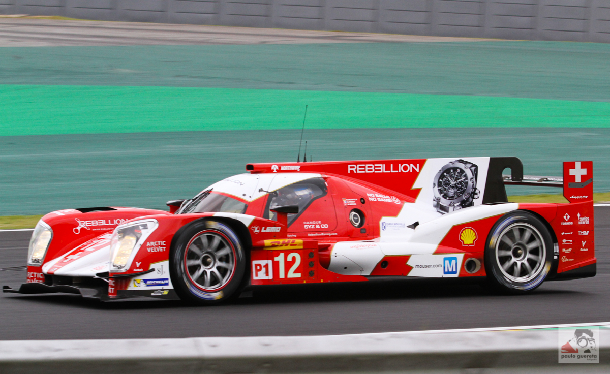 FIA-WEC - 2014